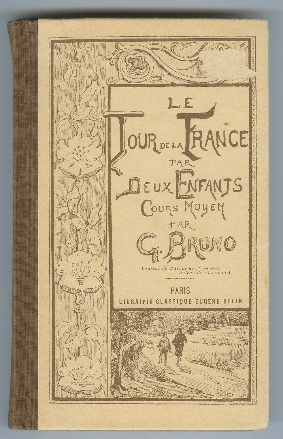 Couverture du tour de France par deux enfants, Augustine Fouillée (1877)